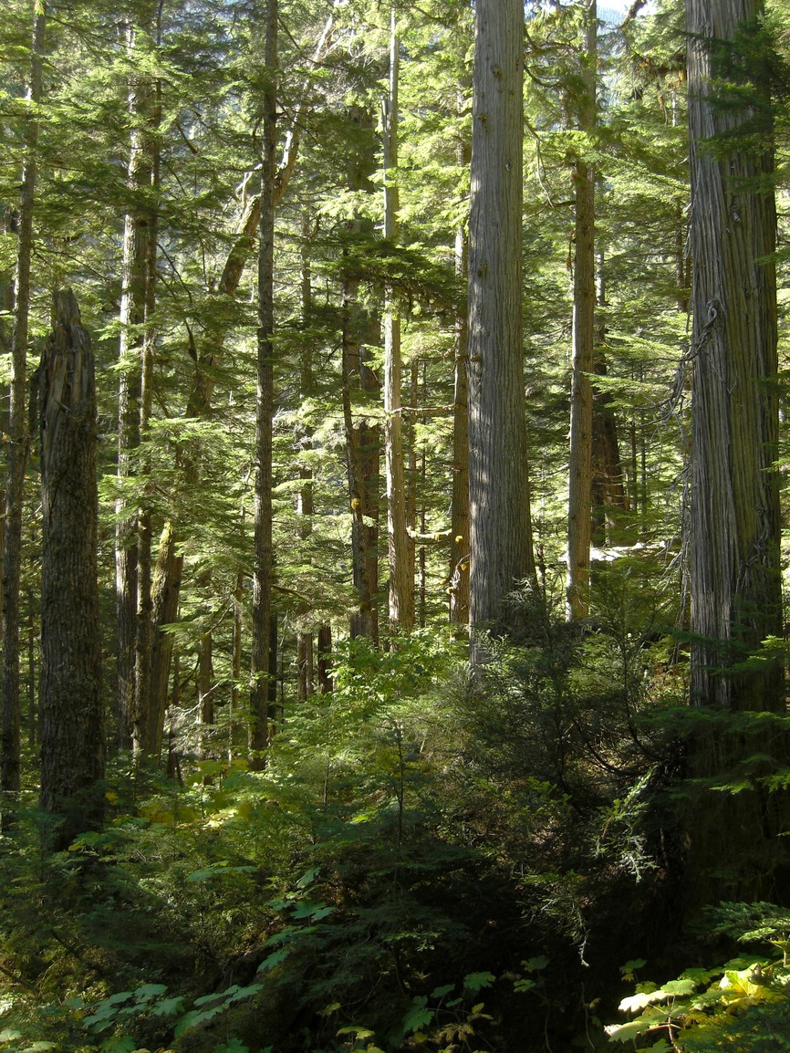 20090927.128 Canada, BC, Incomappleux Inland Rainforest